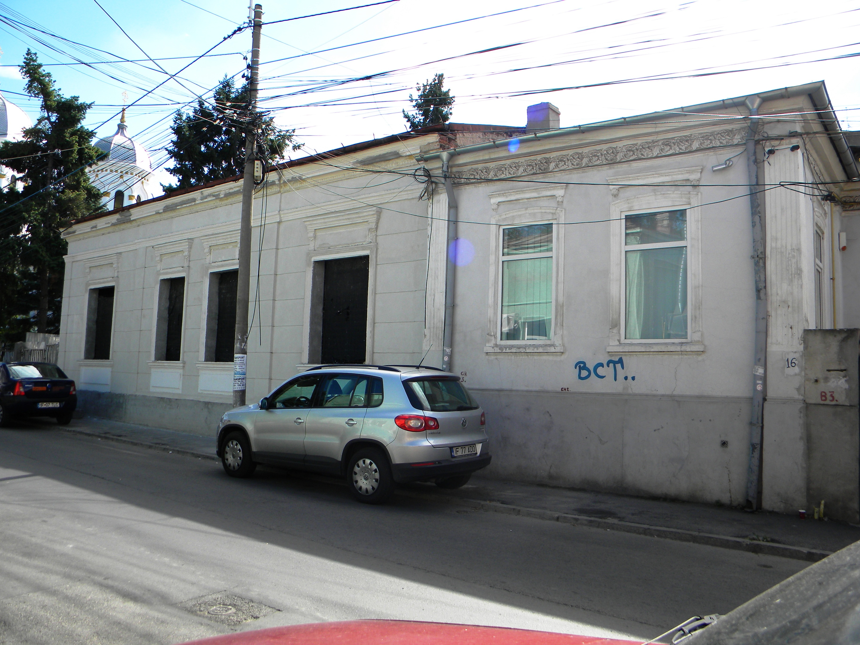 Bucuresti, Romania, Casa pe Str. C.F.Robescu nr. 16, sect. 3